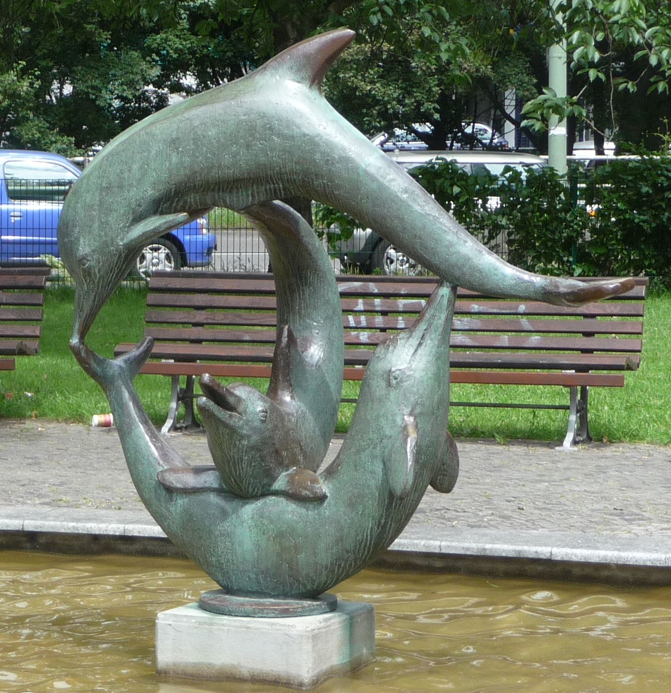 Beim Delphinbrunnen von Hans Bautz (1968) bilden zwei Delphine einen Ring, durch den der dritte Delphin hindurchspringt.